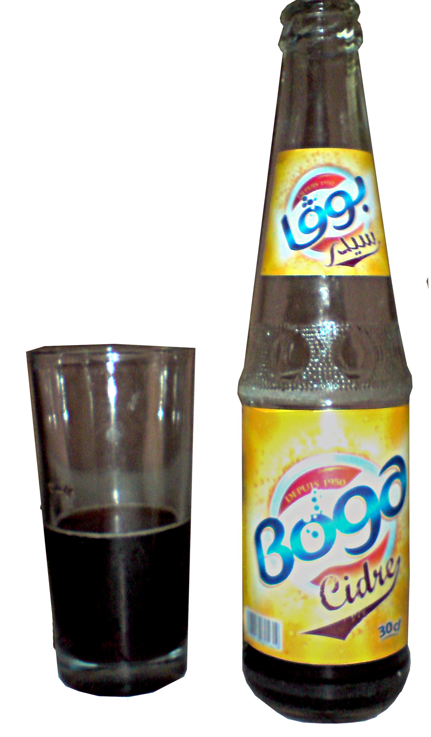 Boisson gazeuse tunisienne : Boga Cidre